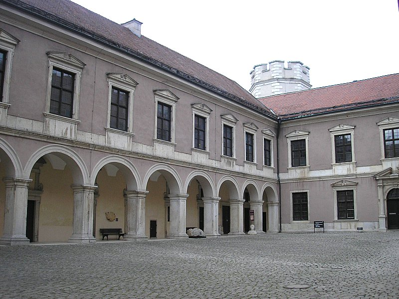 Willibaldsburg über Eichstätt (Oberbayern). Der Innenhof des Gemmingenbaues. Eigene Aufnahme, Dez. 2006 / Willibaldsburg castle above Eichstätt (Upper Bavaria, Germany). The courtyard of the main building (Gemmingenbau). Own photo, Dec. 2006